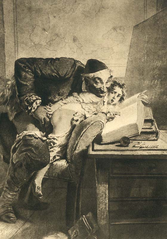 Zichy Mihály rajza